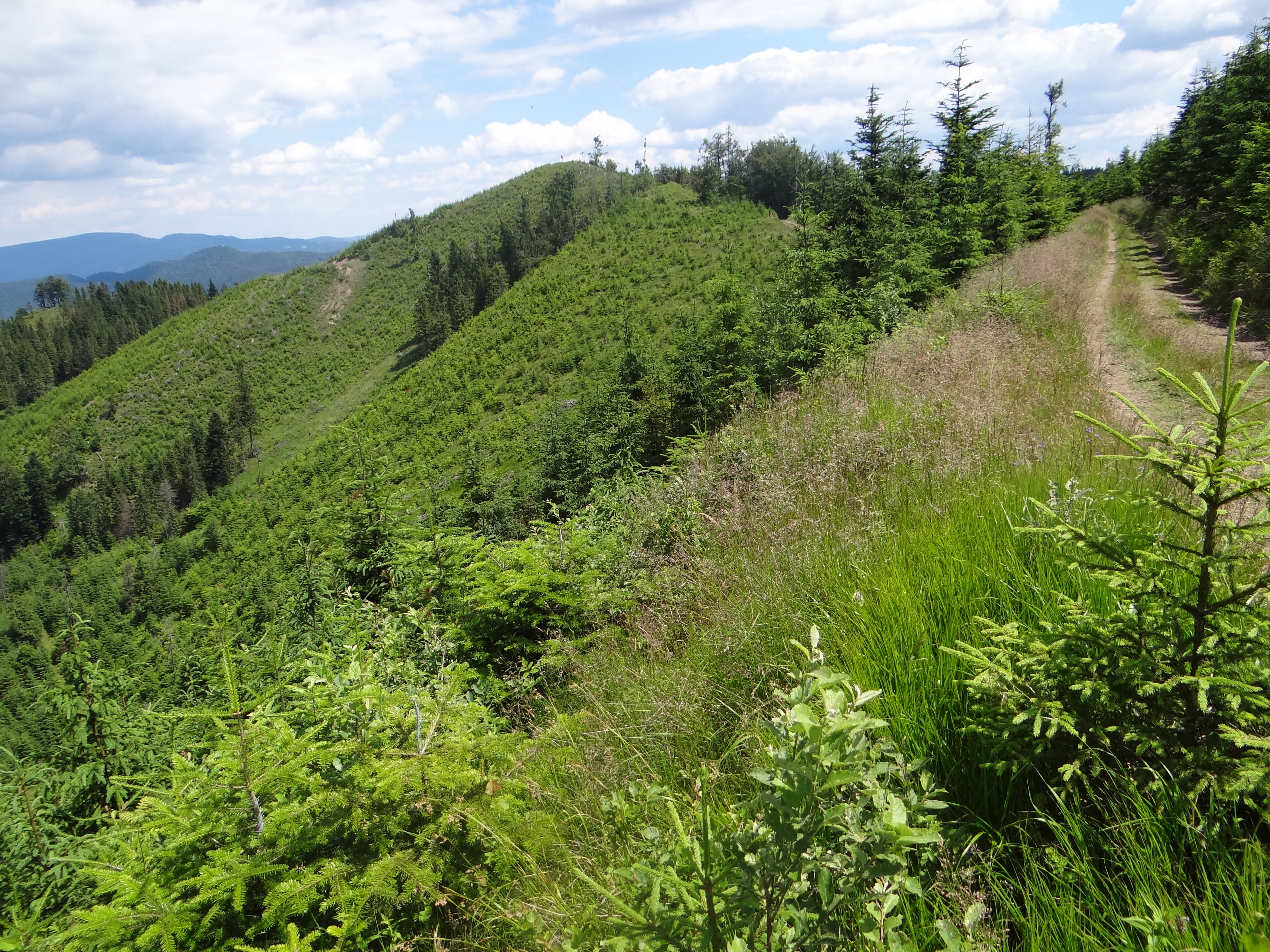 Veterný vrch